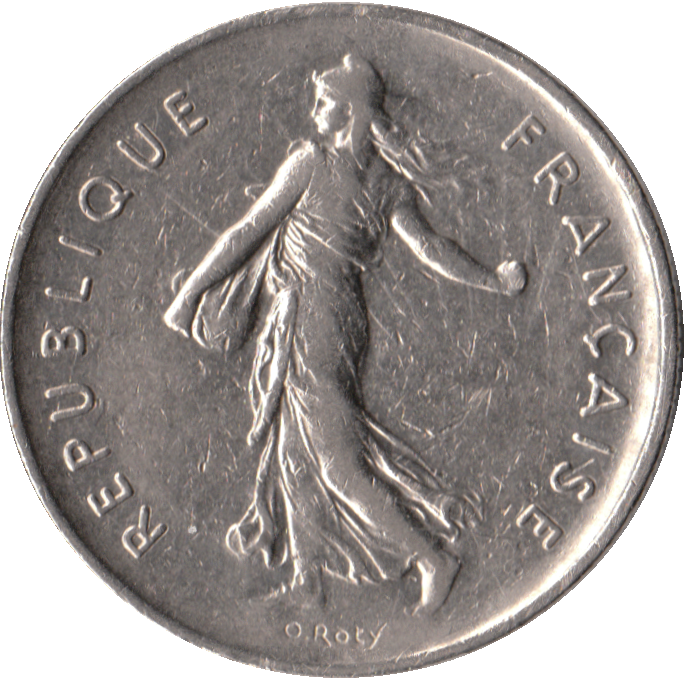 avers d'une pièce de 5 Francs 1970